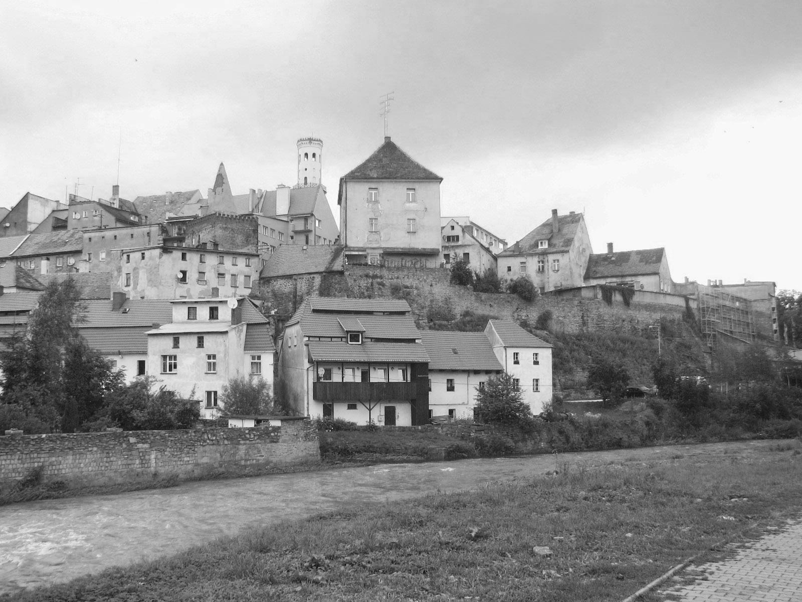 Zespół średniowiecznego wójtostwa w Bystrzycy Kłodzkiej wraz z fragmentem murów miejskich - widok od północy, z doliny Nysy Kłodzkiej. W tym miejscu był kręcony film "Nikt nie woła" z 1960 roku.